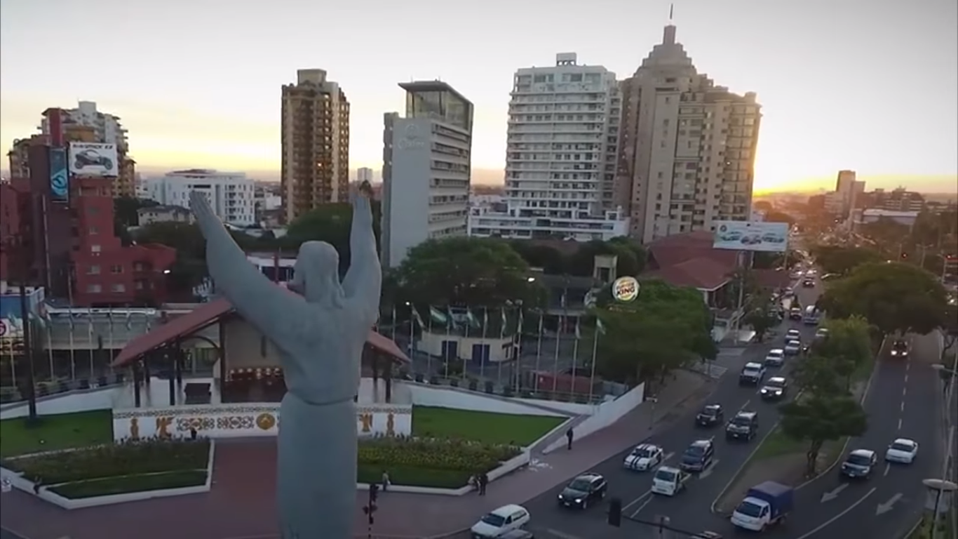 Santa Cruz de la Sierra